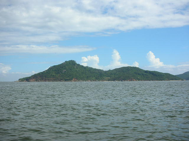 中文（香港）: 周公島。